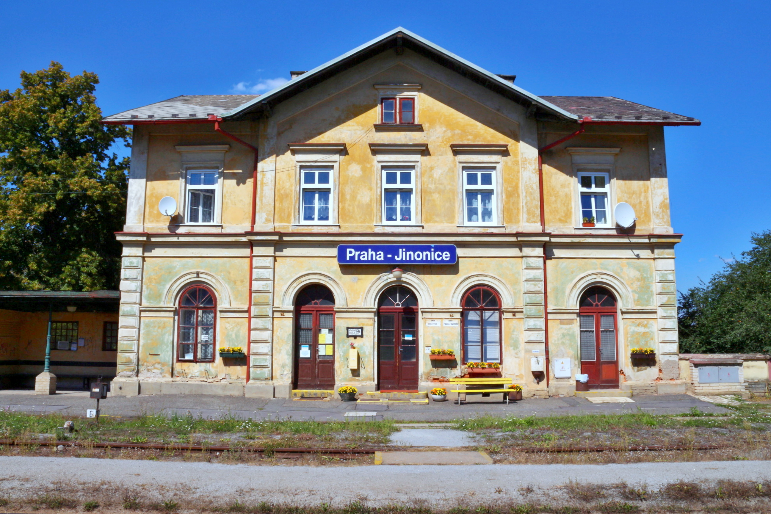 Jinonice vlakové nádraží